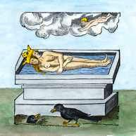 برهة من شوط "السواد" من تدبير الإكسير الأعظم الكيميائي، يرمز إليه وجودُ الغرابين، حيث النفس "تغوص نازلةً فتحيي الجسمَ المطهَّر من أدرانه" (عن مخطوط كيميائي بعنوان مسبحة الفلاسفة الوردية، 1550). يلاحَظ الاندماج بين الأنثى والذكر، الملكة والملك، لتكوين أحديَّ الجنس الأقدس.